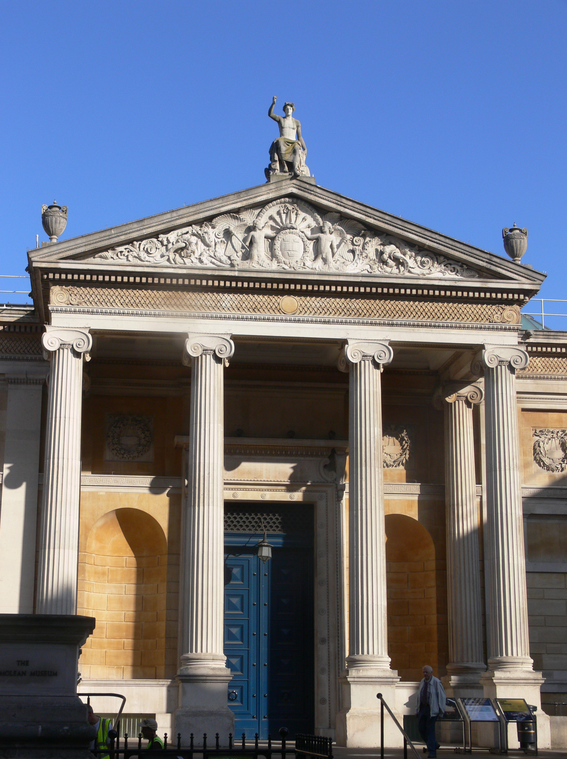 Oxford - Ashmolean Museum